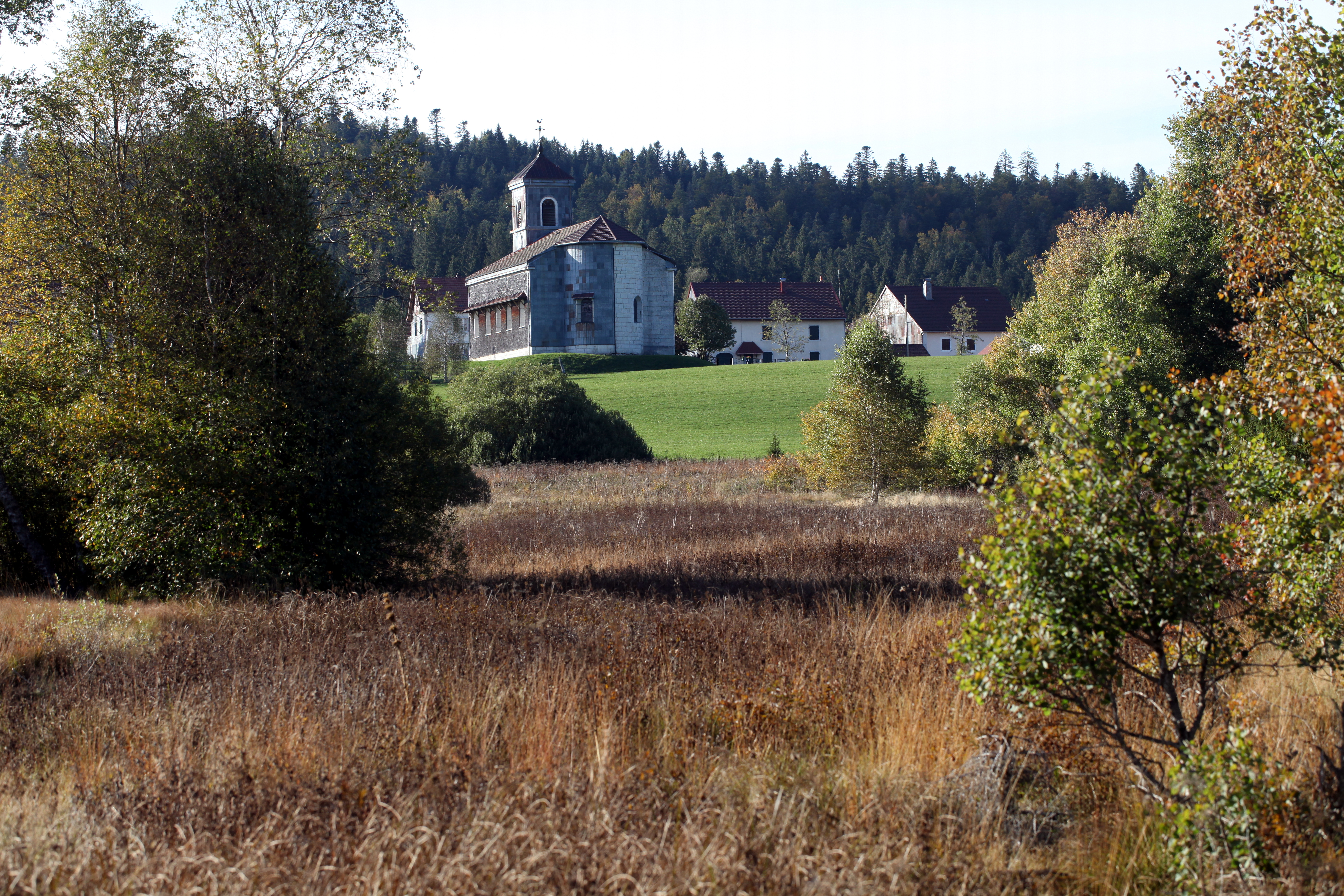 L'église de Chaux-des-Prés vue de la tourbière.